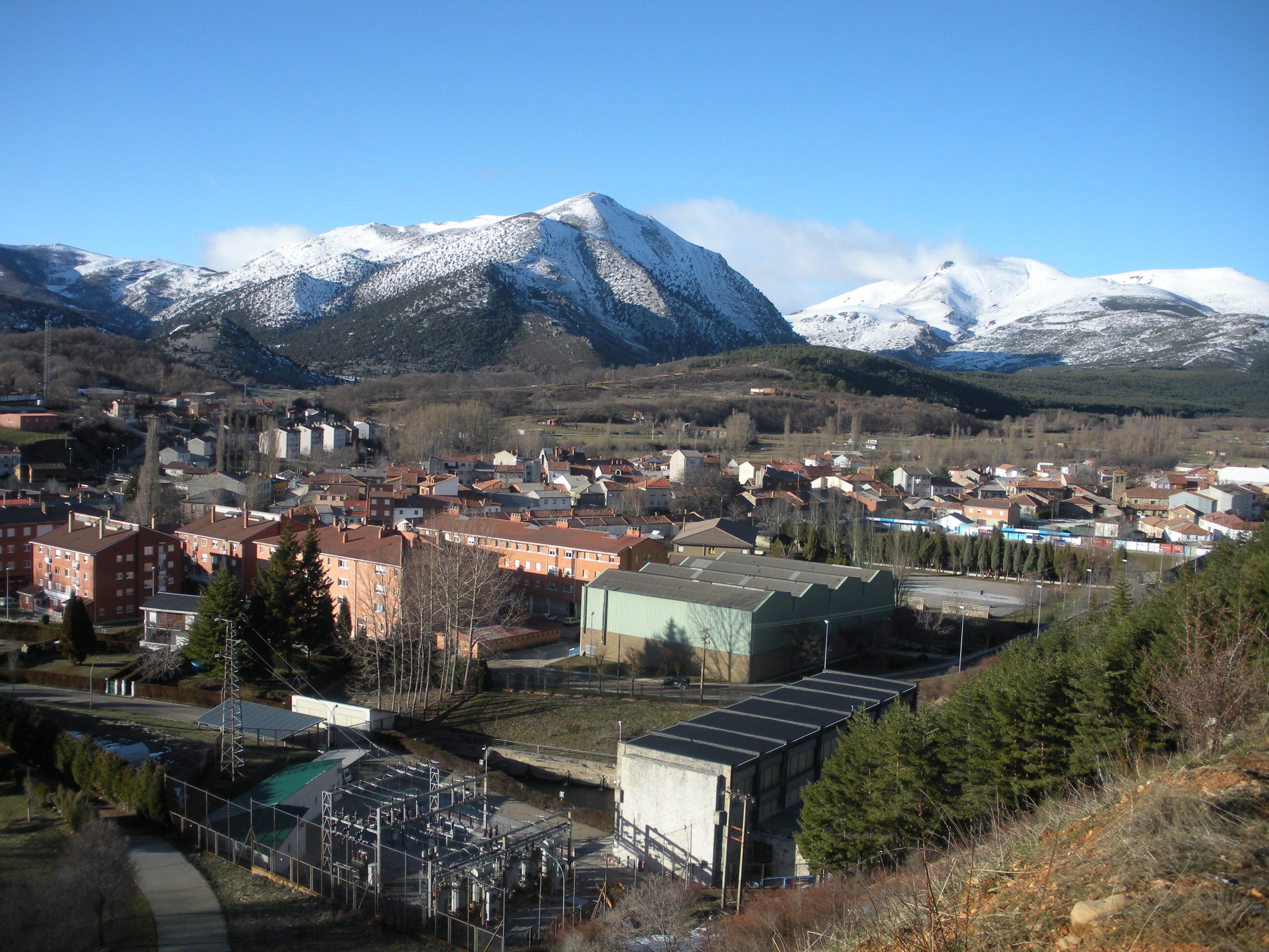 Vista de Velilla del Río Carrión (Palencia) desde la peña.